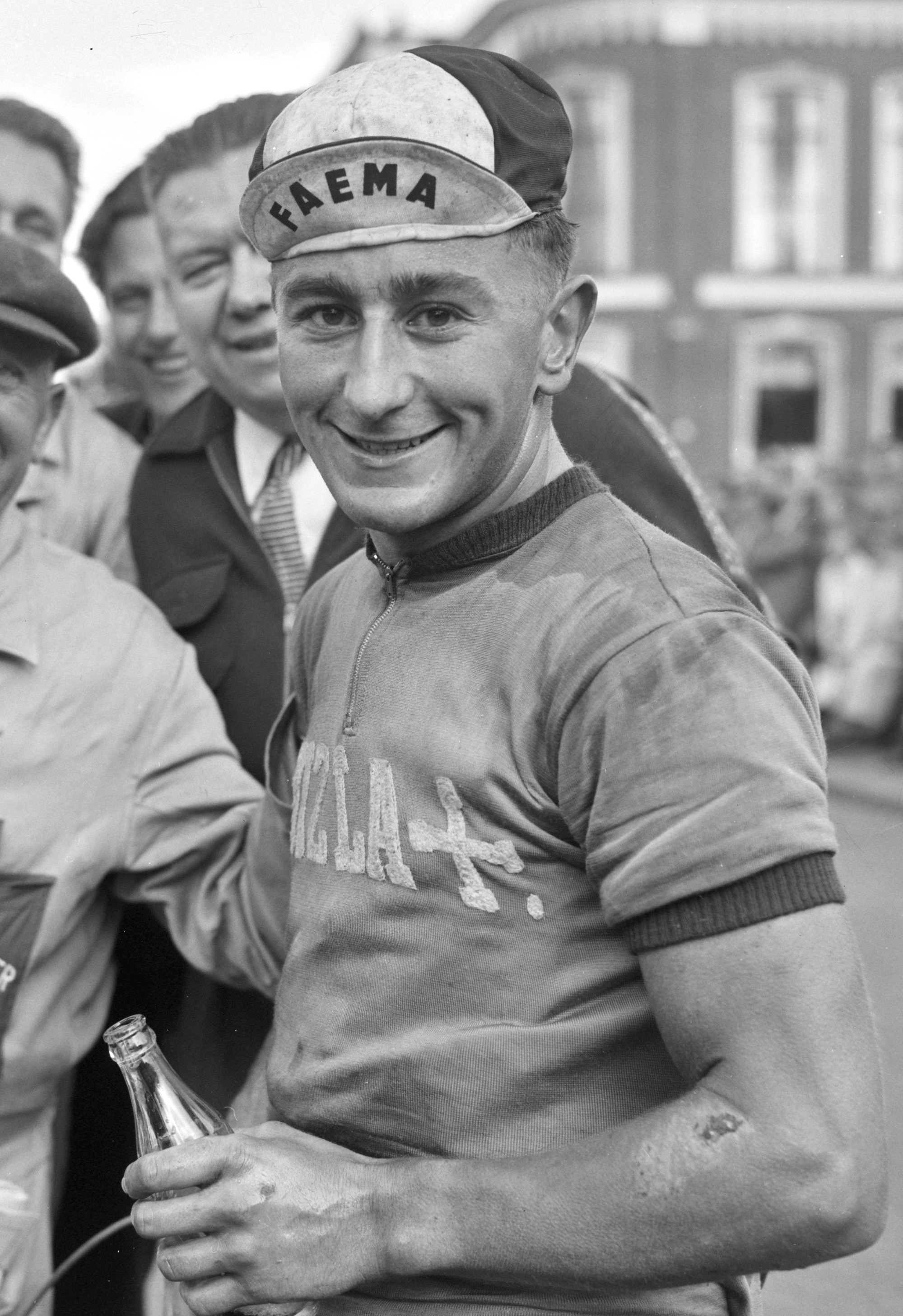 Ronde van Nederland tweede dag. Eerste belg W. Vannitsen